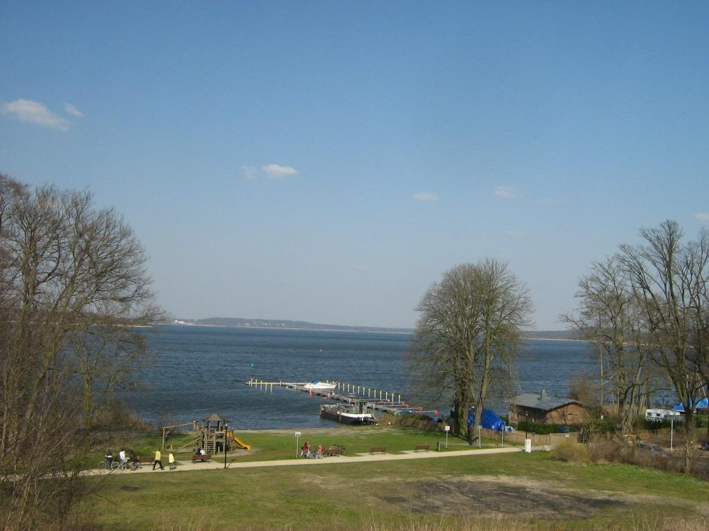 the Lake "Schwielowsee" (River Havel)in Brandenburg (Germany) - Blick von Ferch über den Schwielowsee